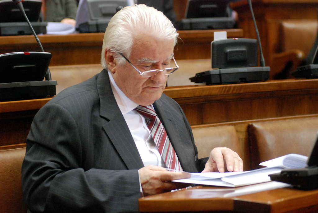 Dragoljub Mićunović na sednici Skupštine Srbije (9. april 2009)